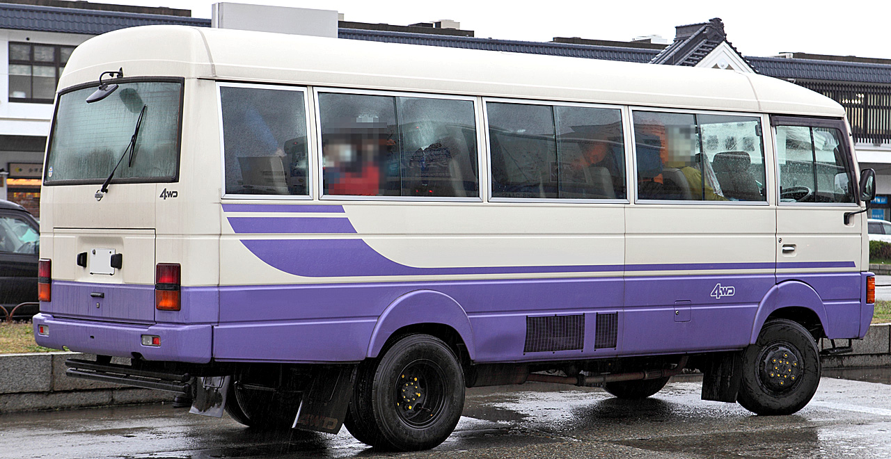 Nissan Civilian 4WD